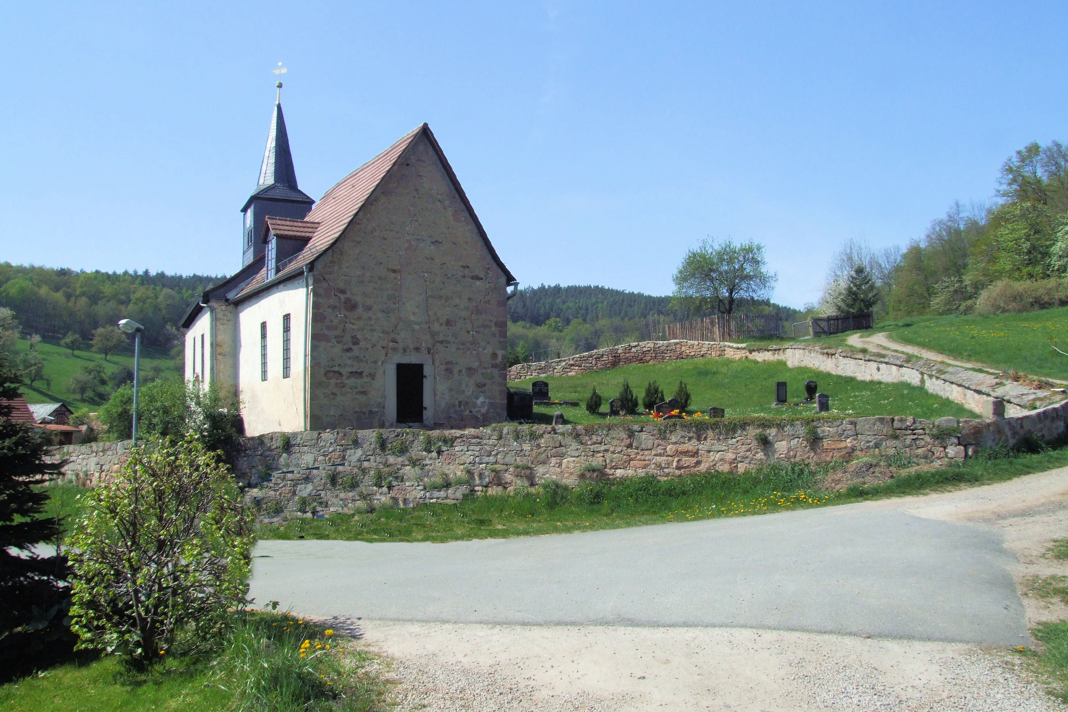 Kirche Oberhasel